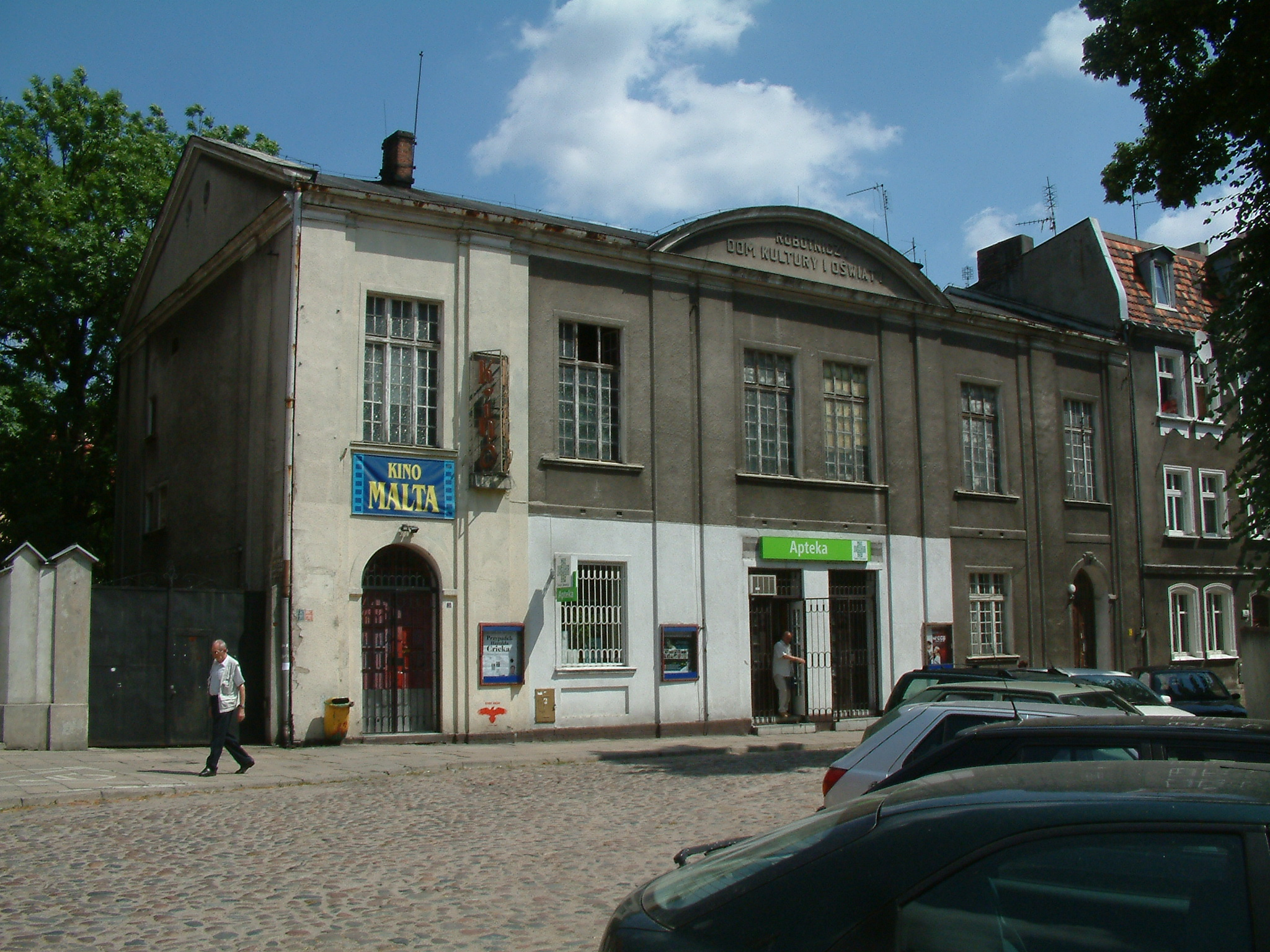 Malta Cinema in Poznań